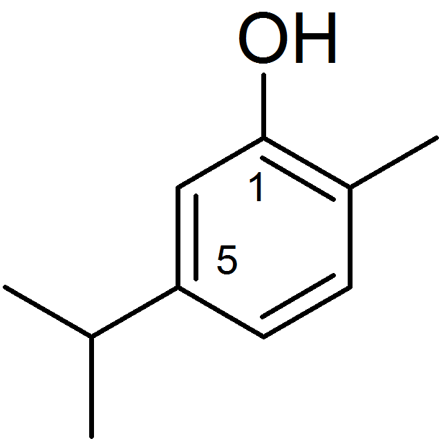 Struktur des Carvacrol